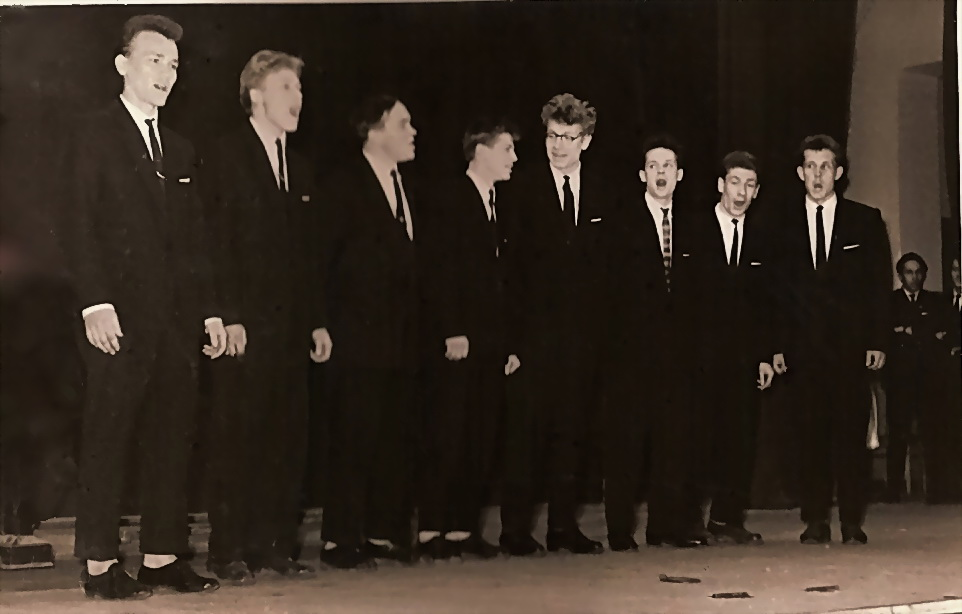 Только что созданный ансамбль на студенческой весне 1962 года. Еще не все партии в полном составе: должно быть 4 партии по 3 человека — басы, баритоны, вторые тенора и первые тенора .